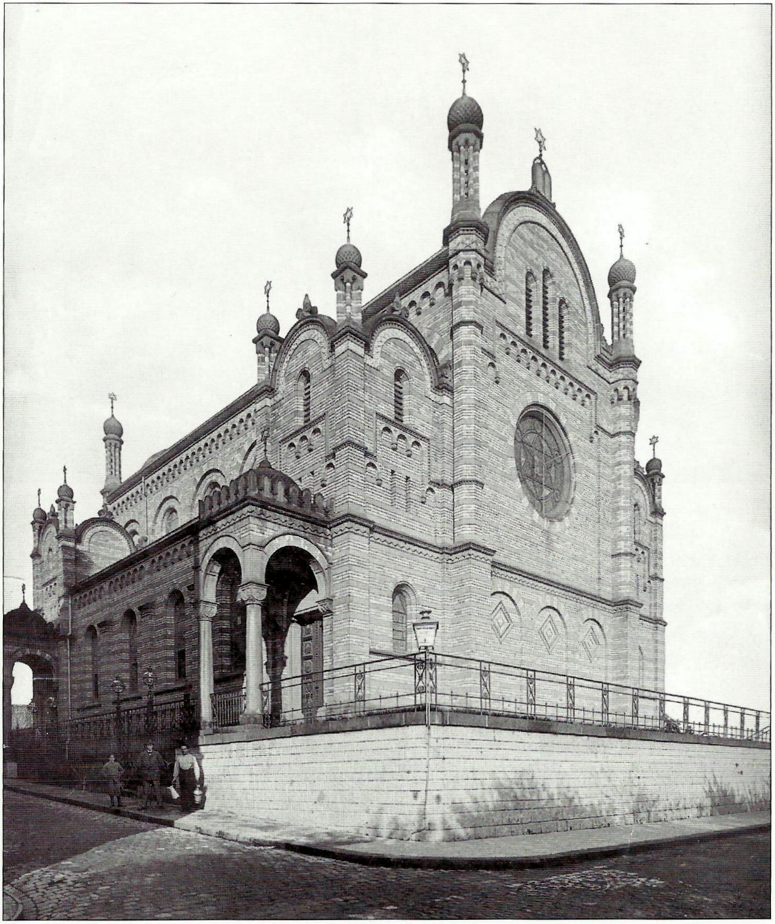 Synagoge (erbaut 1877/78, zerstört 1938), ehemals Tempelstraße 2–6, Bonn. Aufnahme ohne die wegretuschierte Brandmauer des angrenzenden Gebäudes Rheinwerft 10/11.